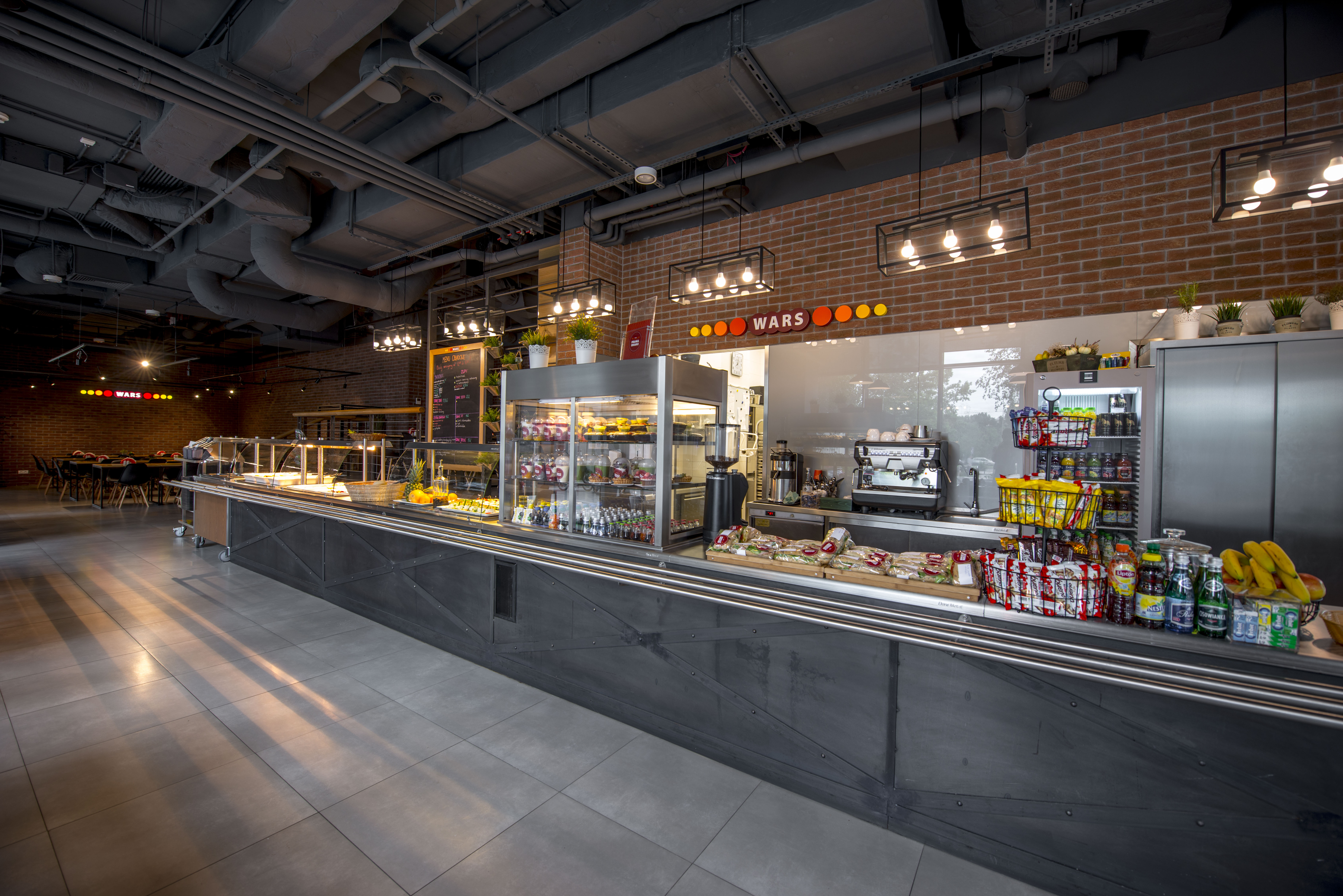 Jedna z czterech restauracji WARS - Restauracja WARS West Station